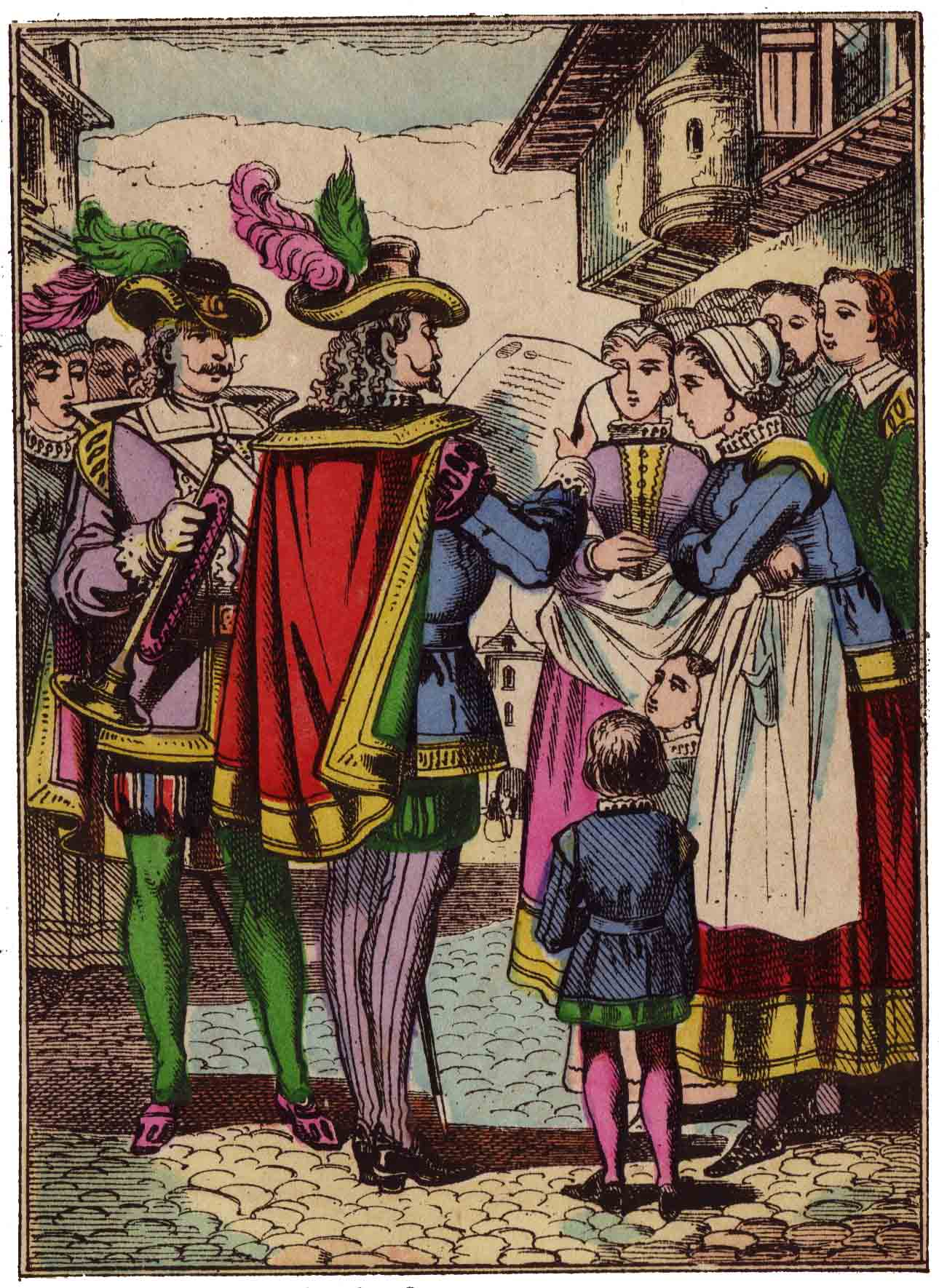 Images d'Épinal : Cendrillon